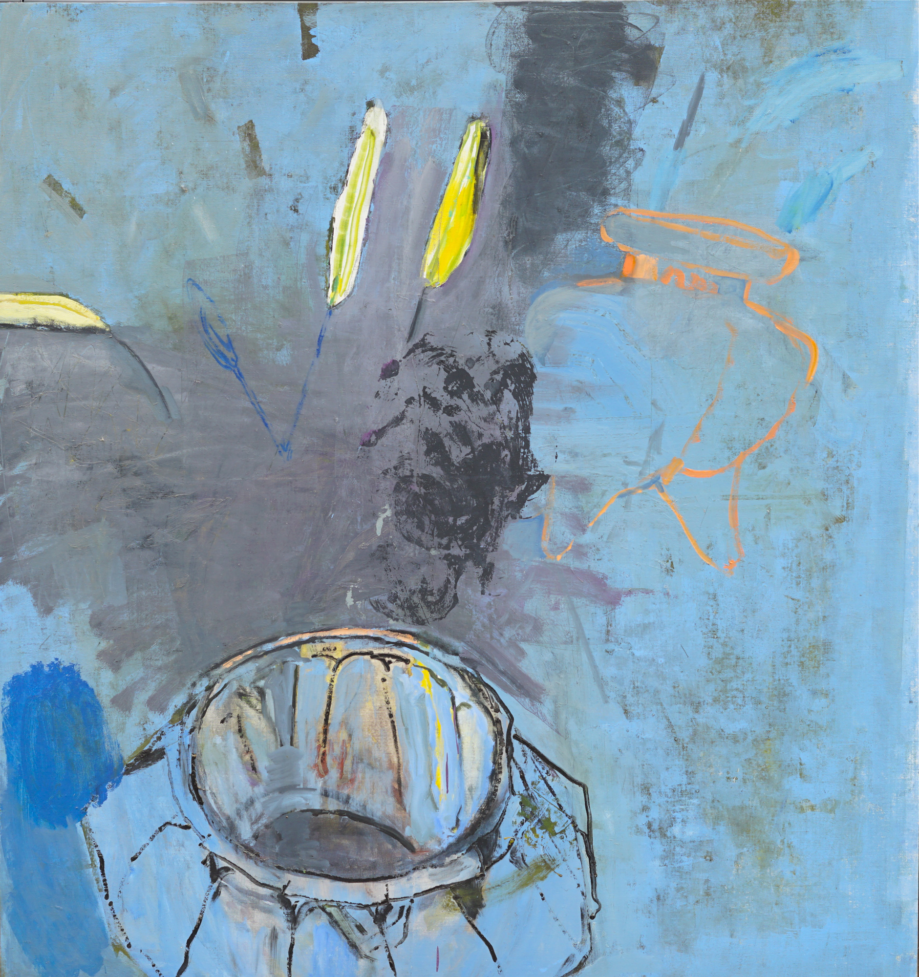 שושן צהוב - 1991